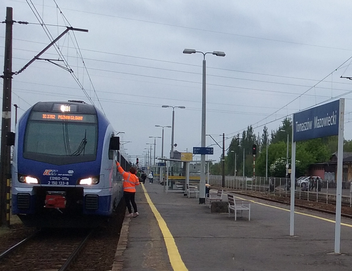 Tomaszów Mazowiecki - InterCity do Poznania na stacji.